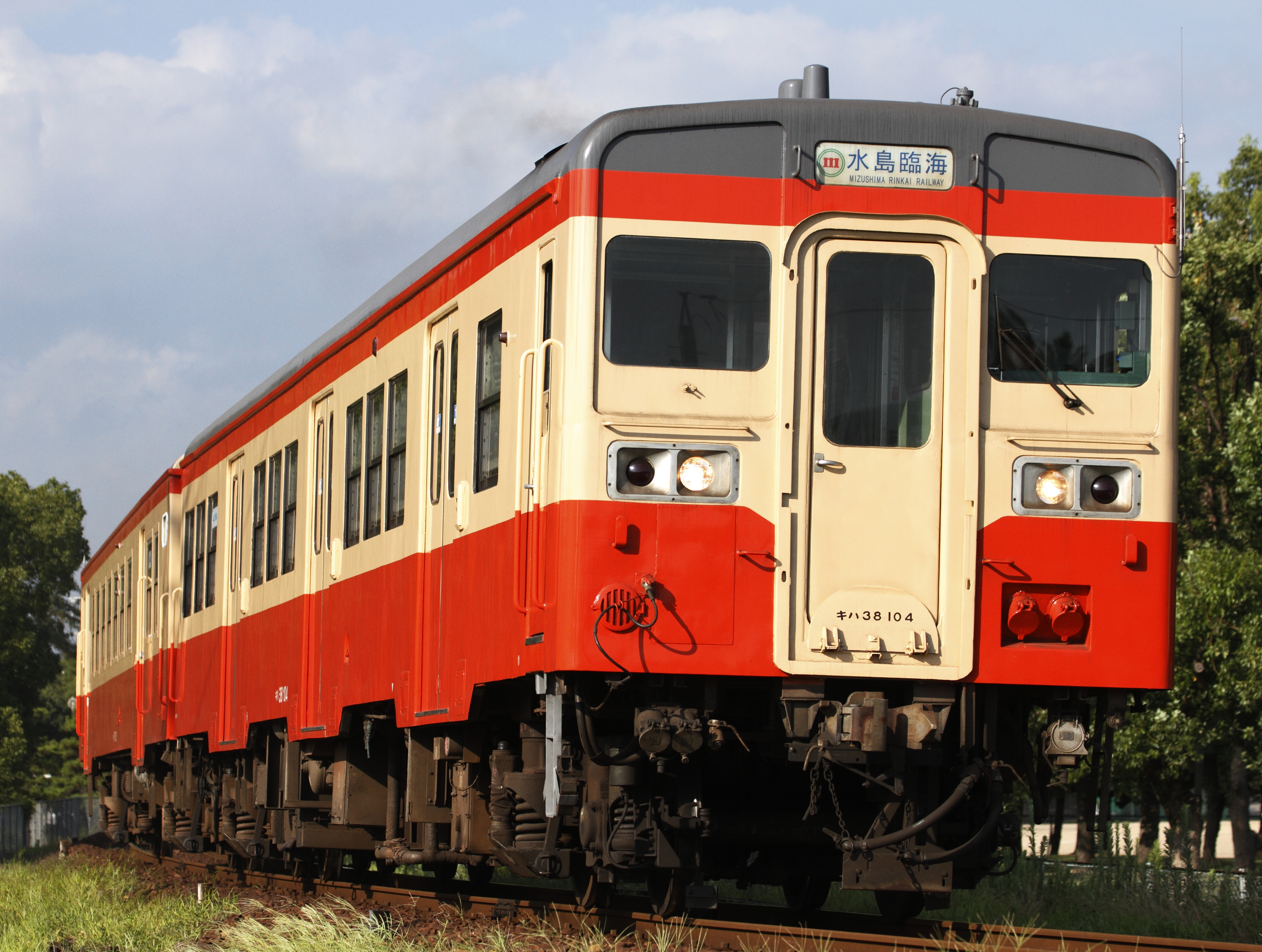 水島臨海鉄道キハ38形気動車 キハ38 104（国鉄色）